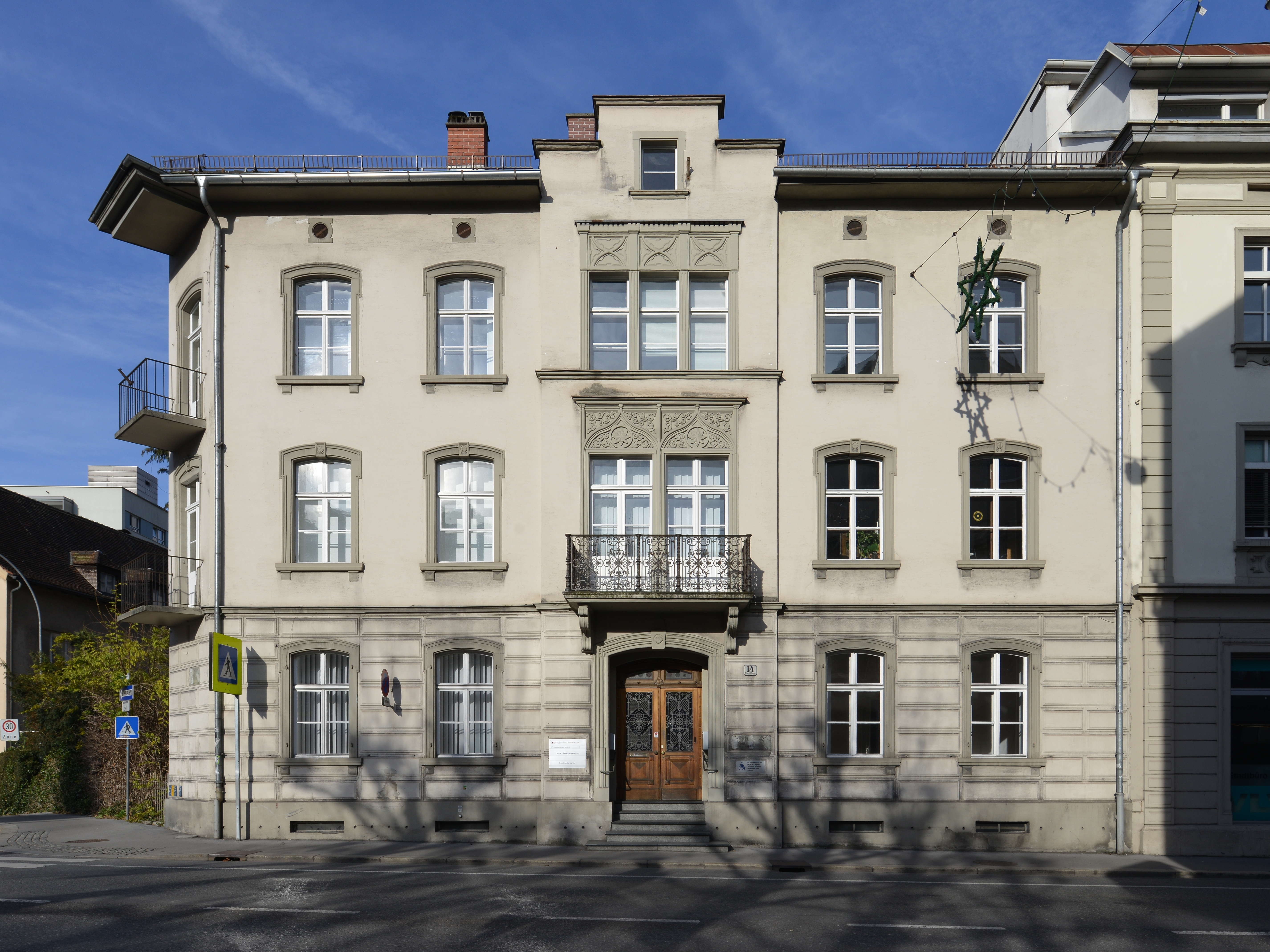 Bürgerhaus Römerstr 14 (Bregenz, Vorarlberg, Austria)